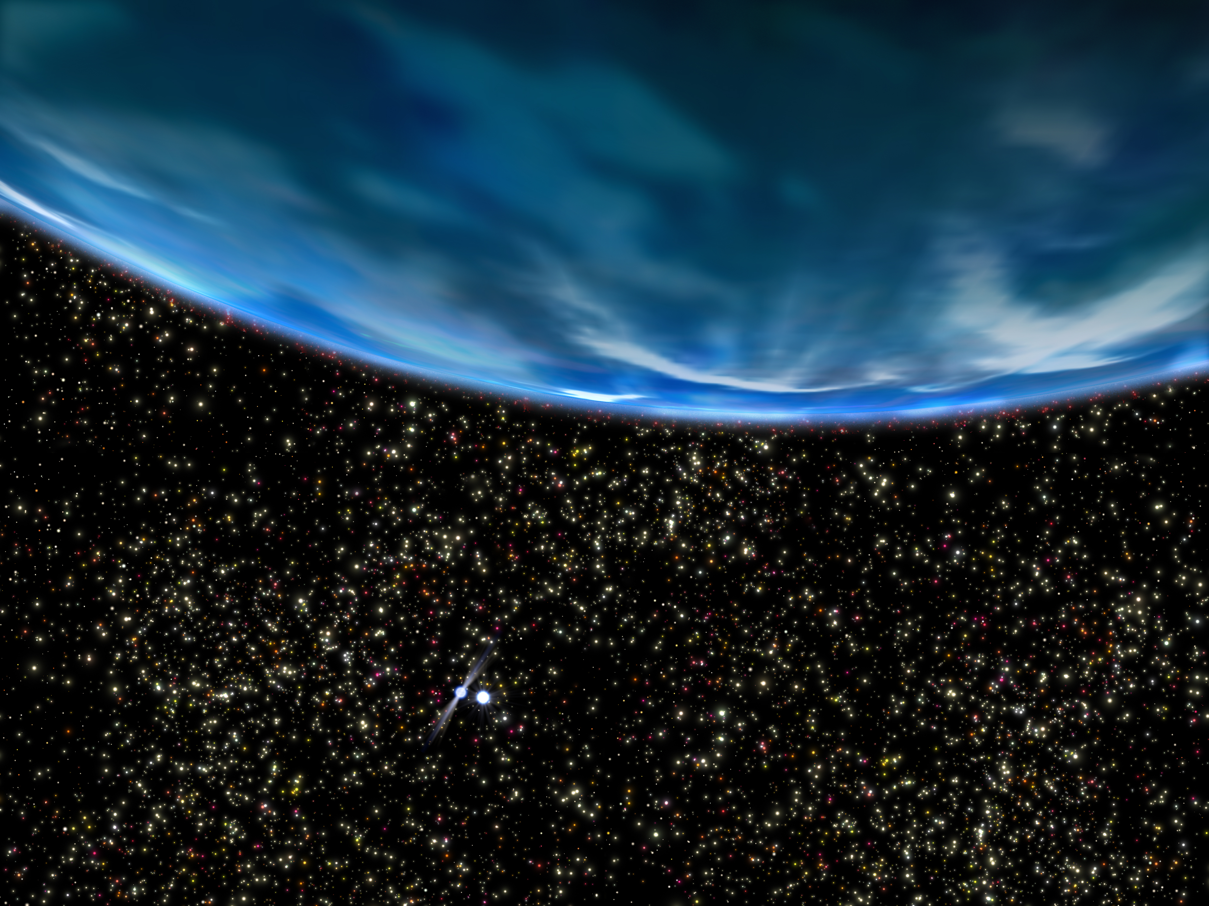 畫家筆下的PSR B1620-26c行星想像圖